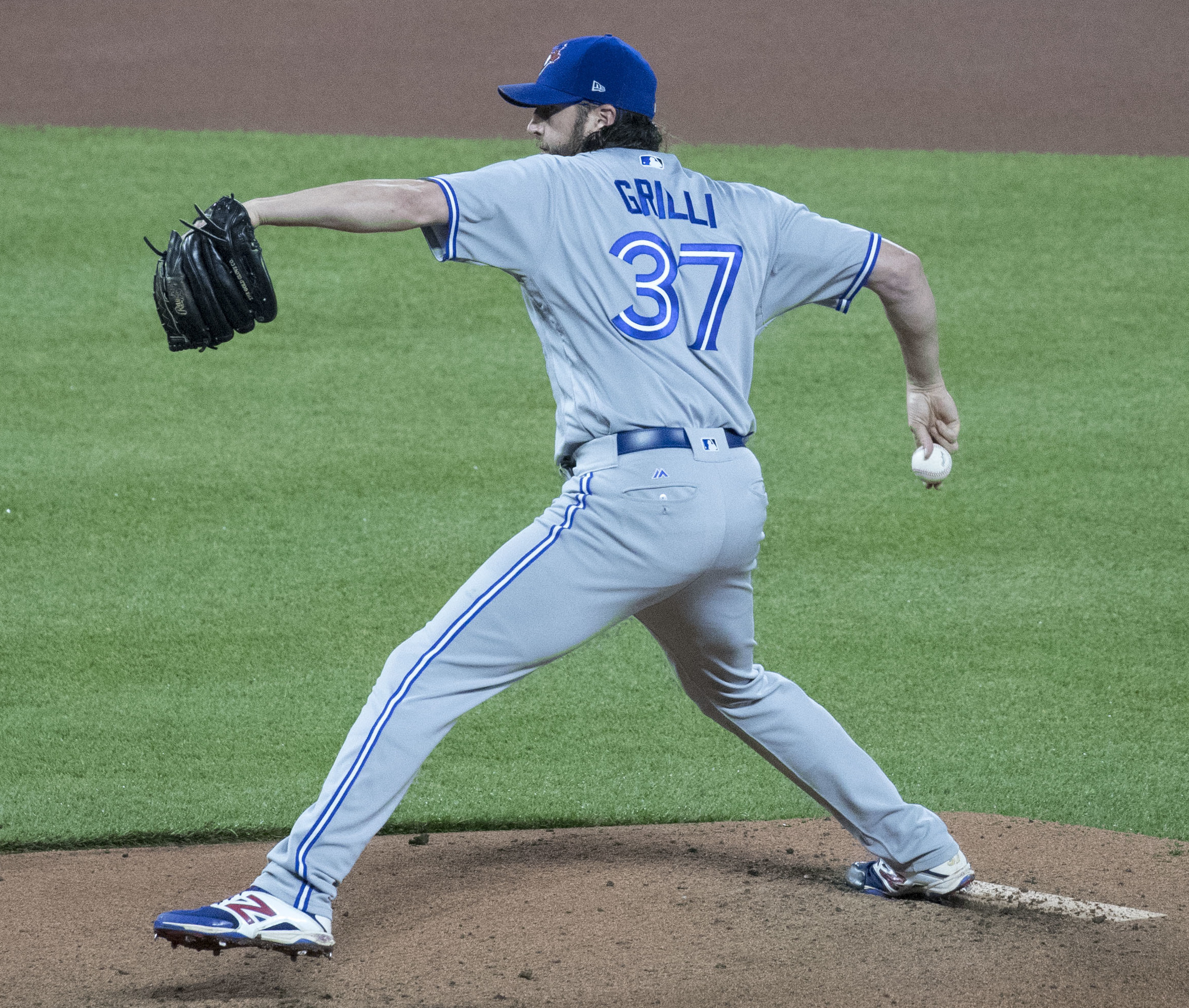 Blue Jays at Orioles 5/19/17